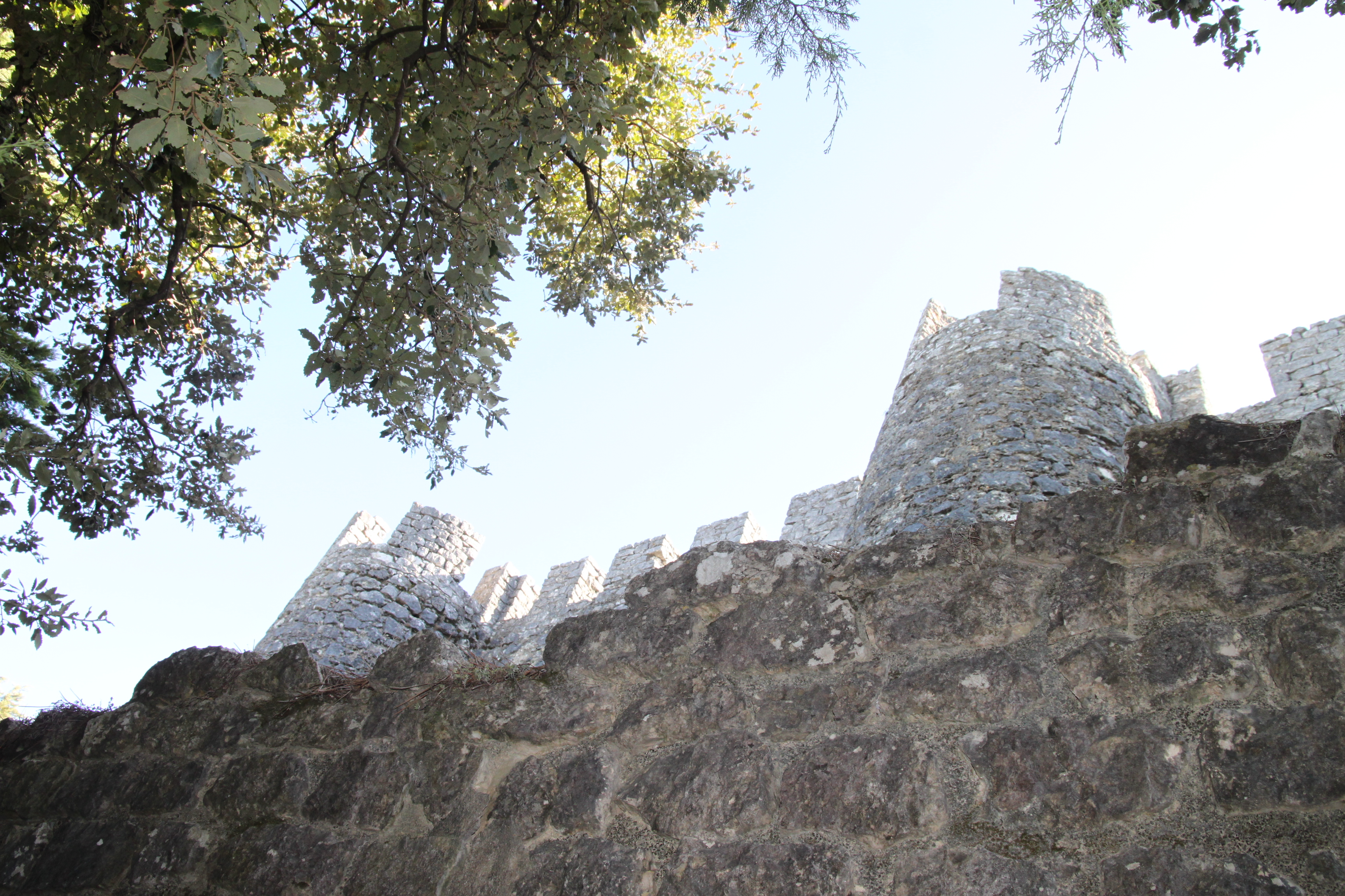 Castelo de Alcanede (ruínas) This file was uploaded for Wiki Loves Monuments in Portugal with the unique identifier 73606.